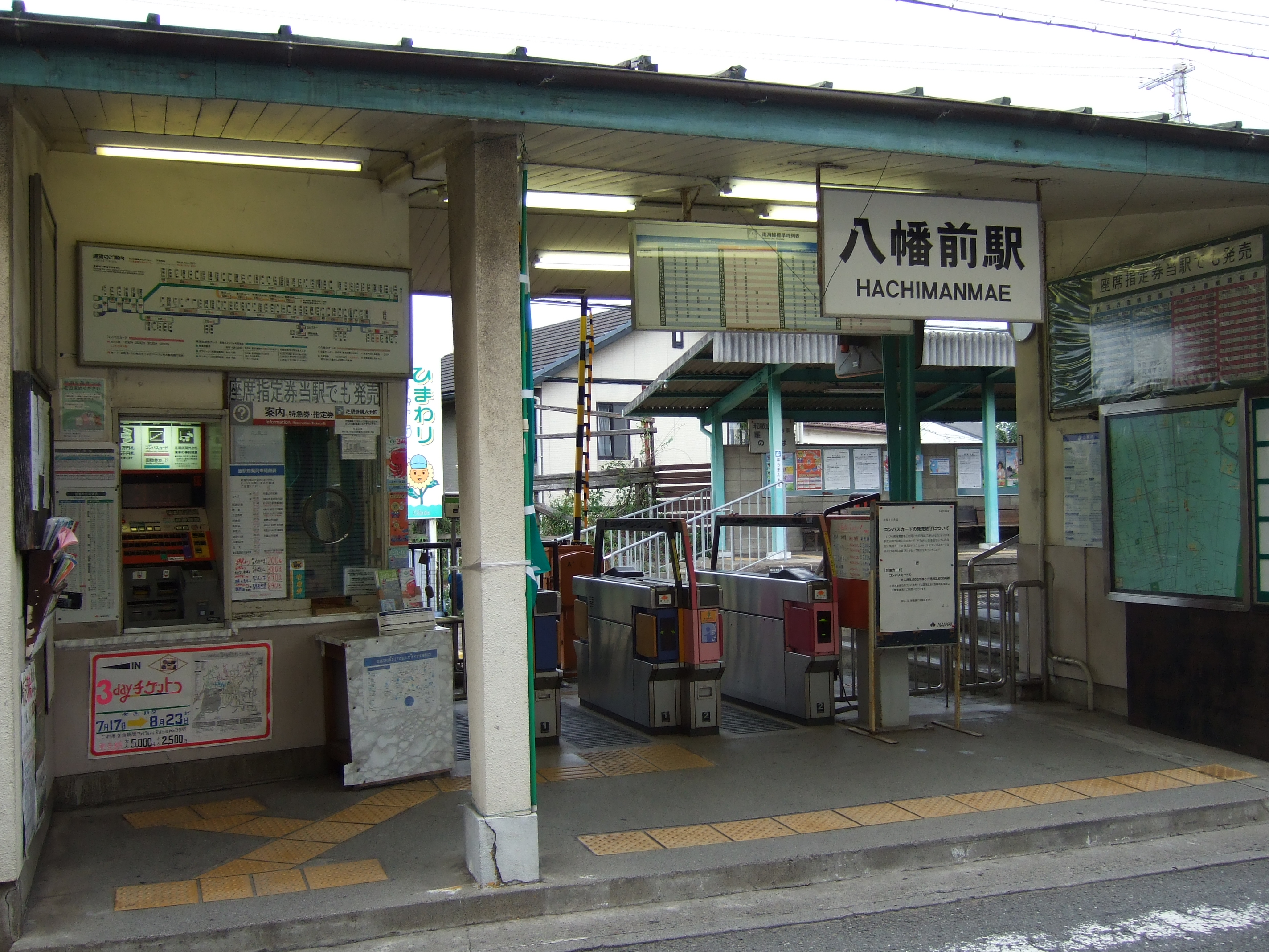 南海八幡前駅駅舎